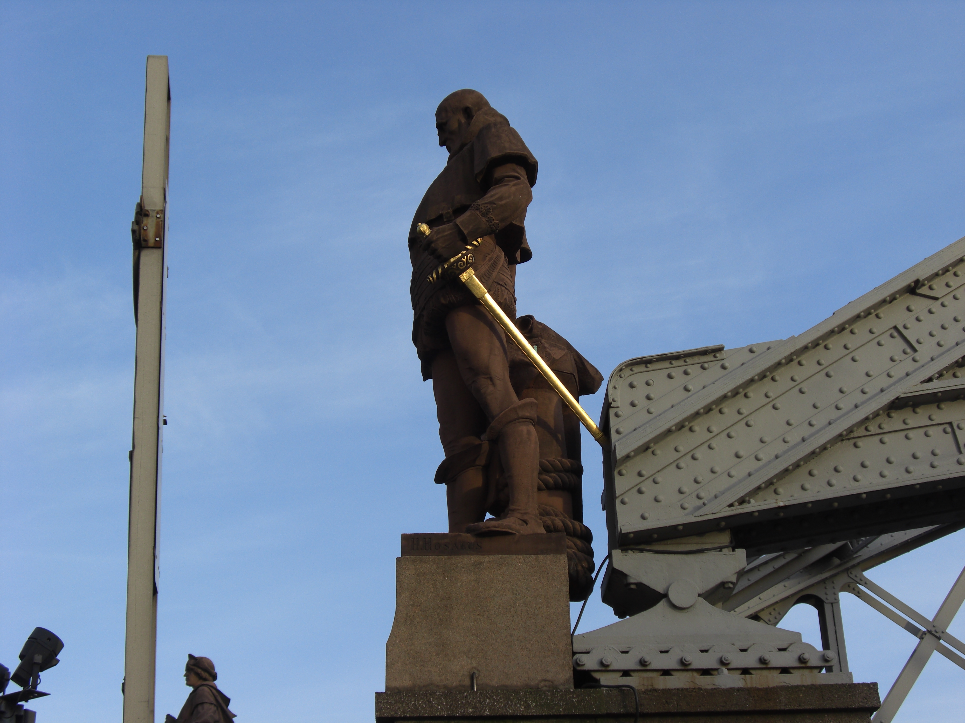 Vasco Da Gama Statue Hamburg Kornhausbrücke